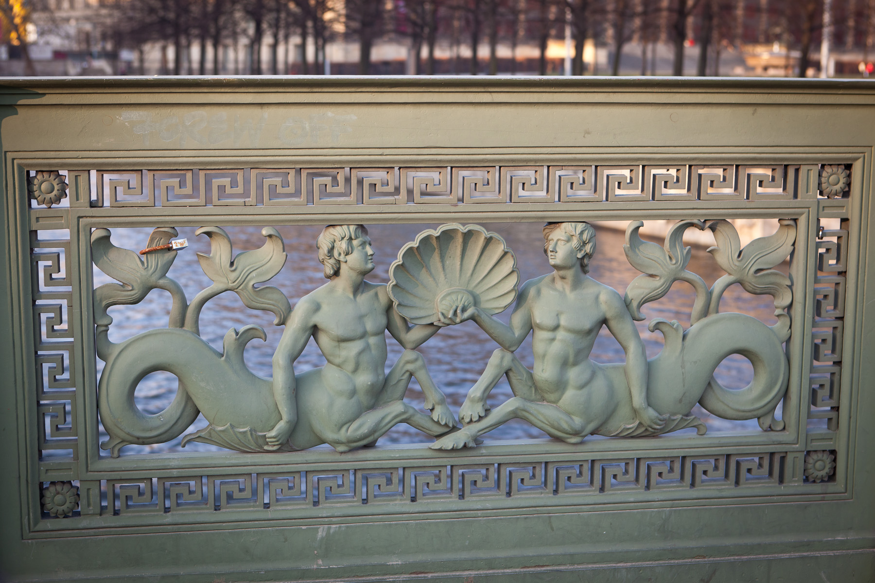 Berlin